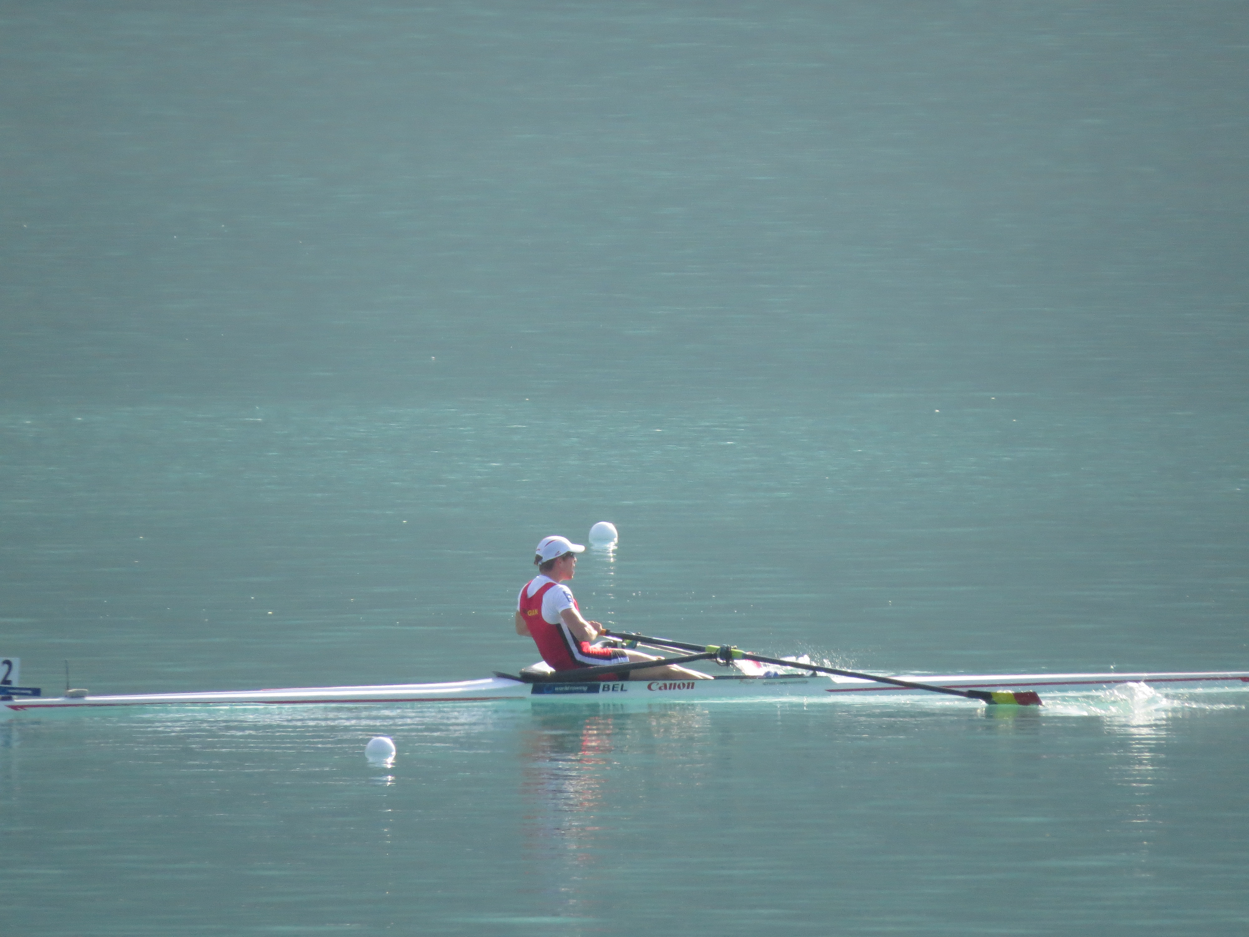 Bateau belge (BRYS, Tim) en finale B du LM1x